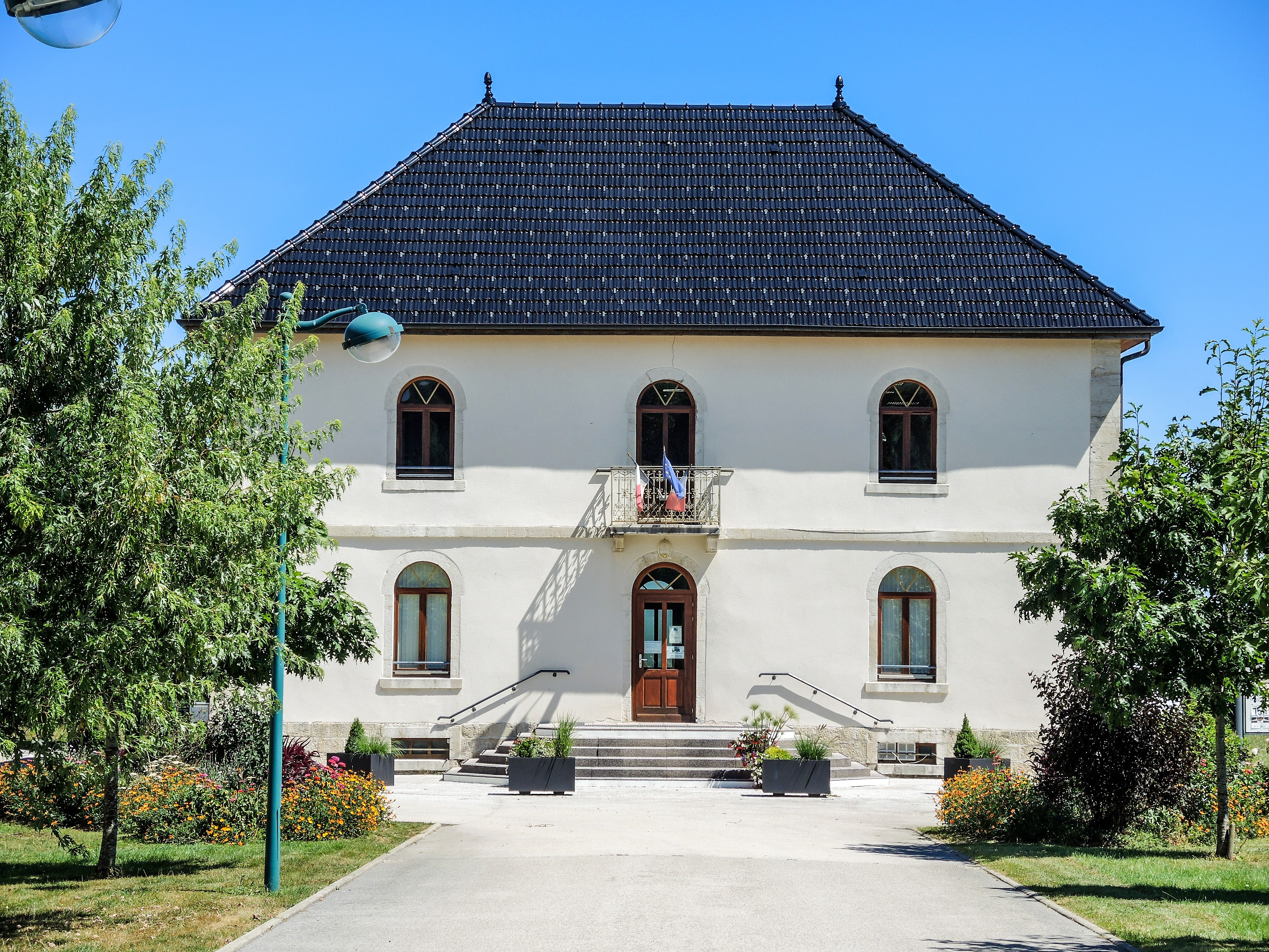 Mairie de Frambouhans. Doubs